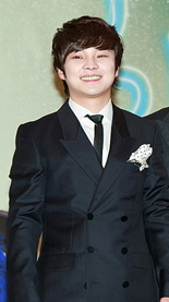 일년에 열두남자 기자간담회